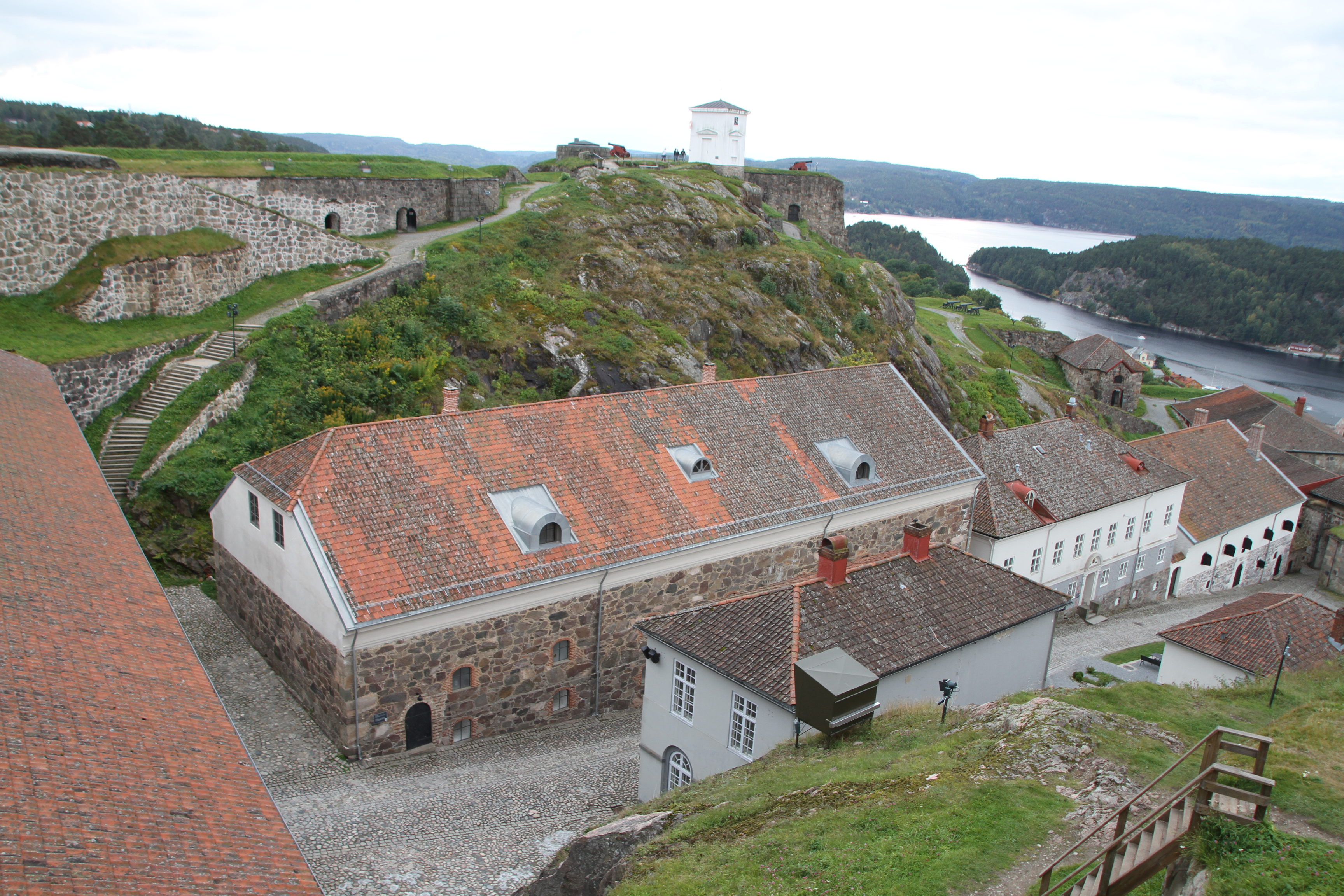 Central parts of the inner area, Fredriksten fort, Halden (Norway)